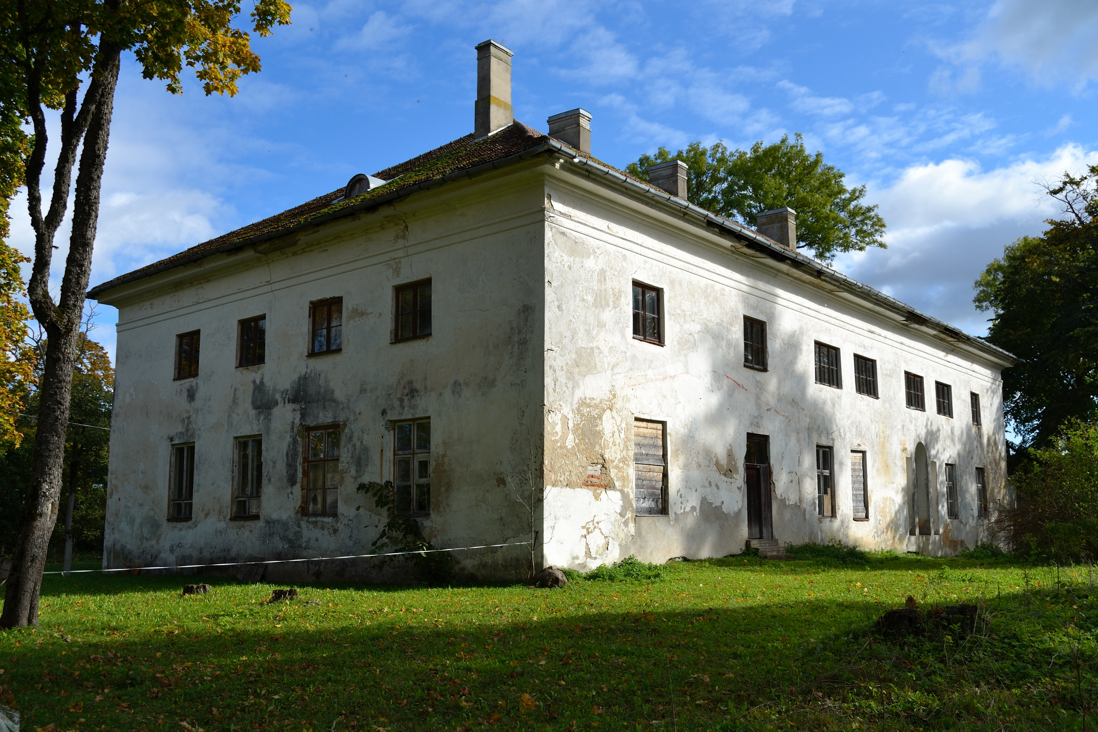 Härgla mõisa peahoone